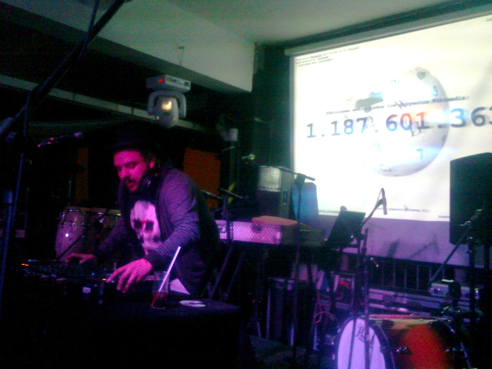 Camilo Lara con el IMS dj set en Pasagüero, en la fiesta de aniversario de Wikipedia. En pantalla, el contador de ediciones de los proyectos Wikimedia.